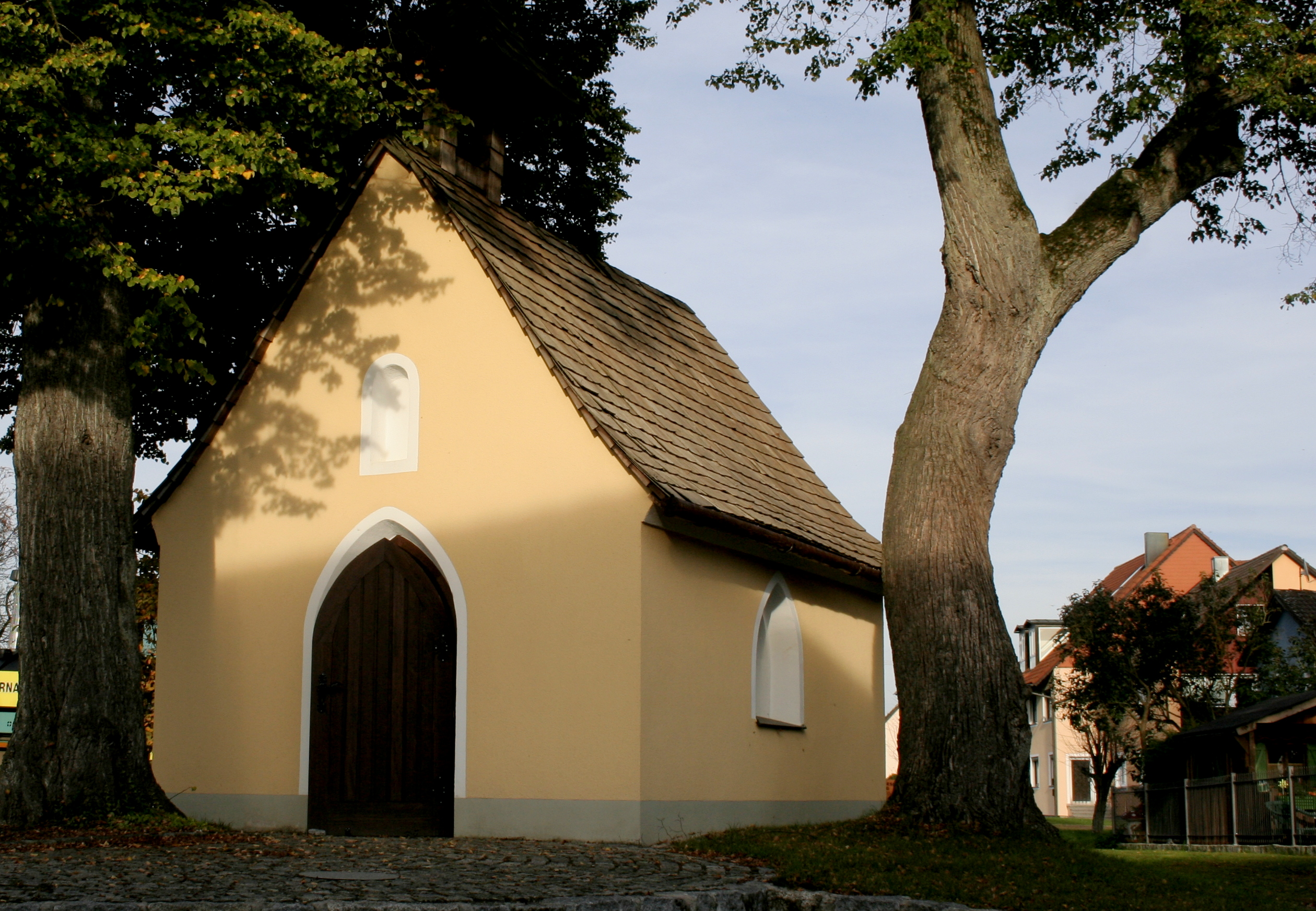 Baudenkmal Deutschland; Bayern; Oberpfalz; Neustadt a.d.Waldnaab; Pleystein; Lohma; Alte Dorfkapelle, wohl 19. Jh.; mit Ausstattung.This is a photograph of an architectural monument.